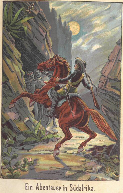 Blizzard